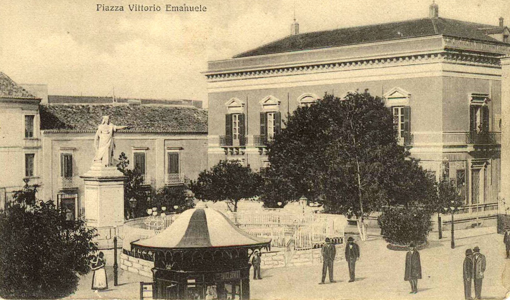 old postcard of Reggio Calabria